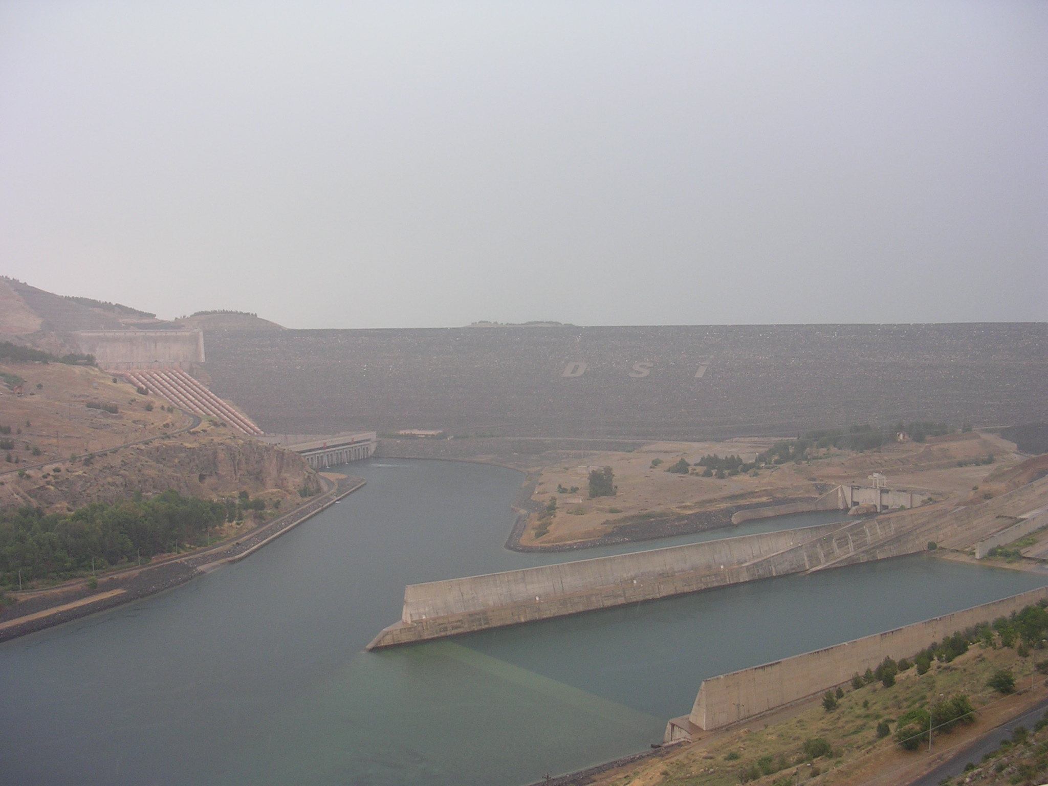 Atatürk Barajı.